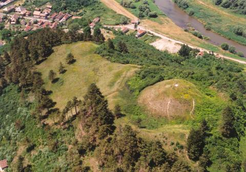 Sajónémeti, Hungary, aerialphotography